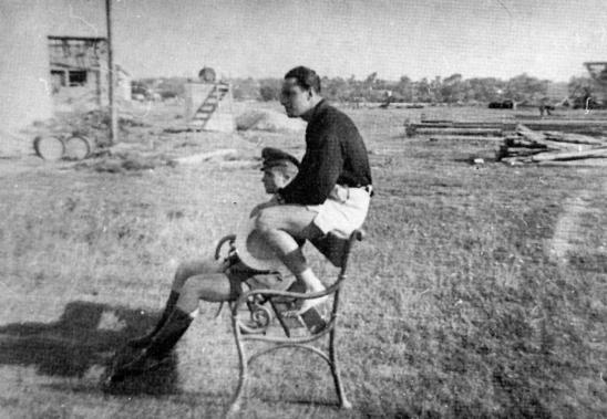 Петър Манолев и Димитър Списаревски – 1942г.